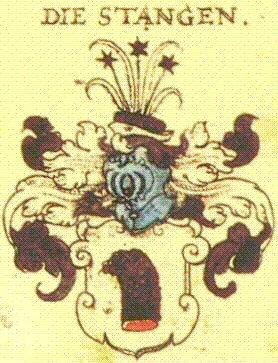 Wappen der thüringischen Adelsfamilie von Stange